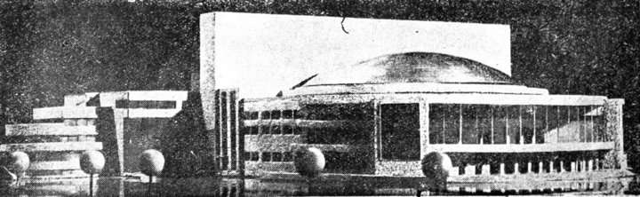 Макет Беларускага дзяржаўнага тэатра, 1933 год. арх.Г.Лаўроў